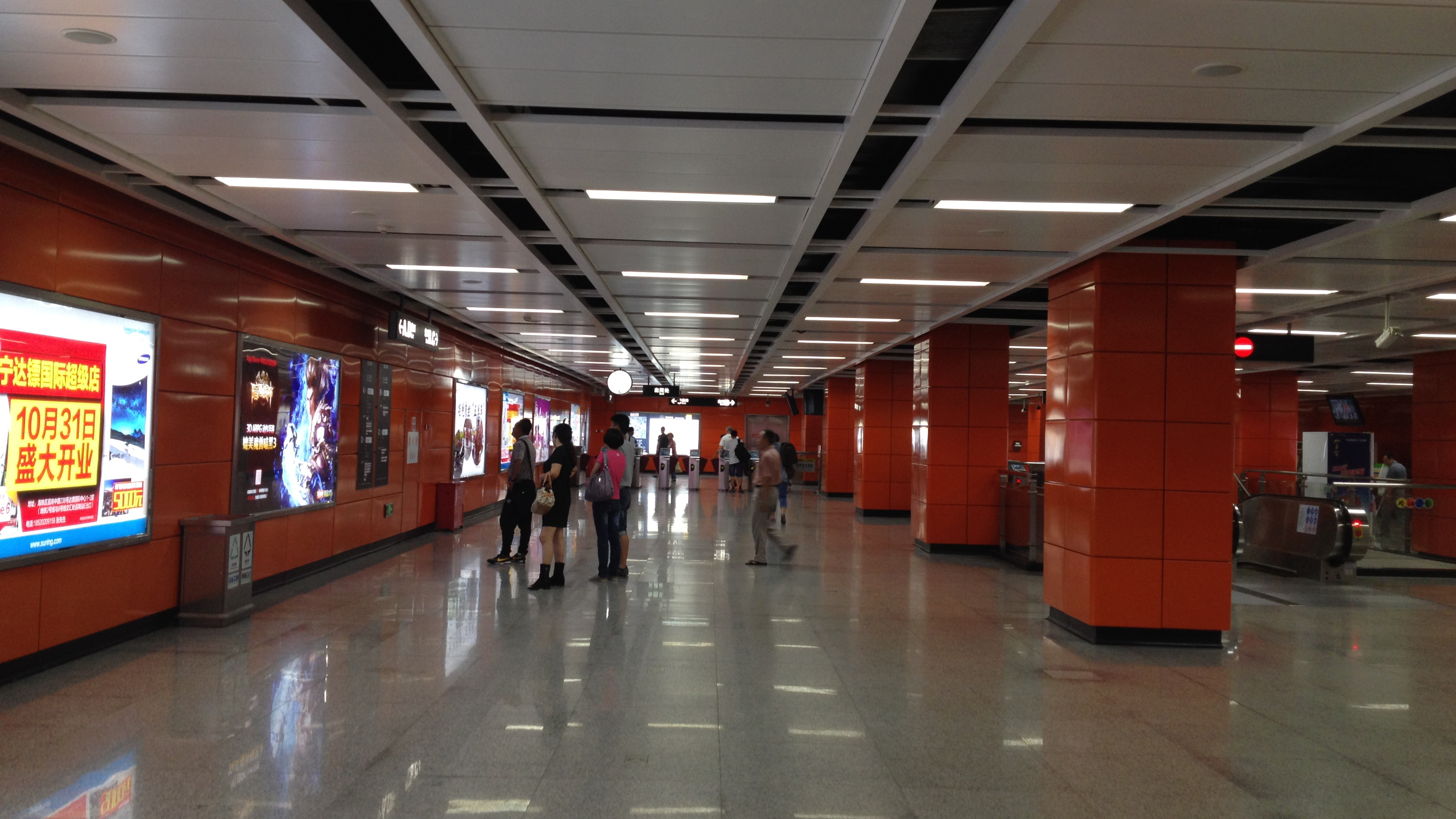 广州地铁沙园站站厅